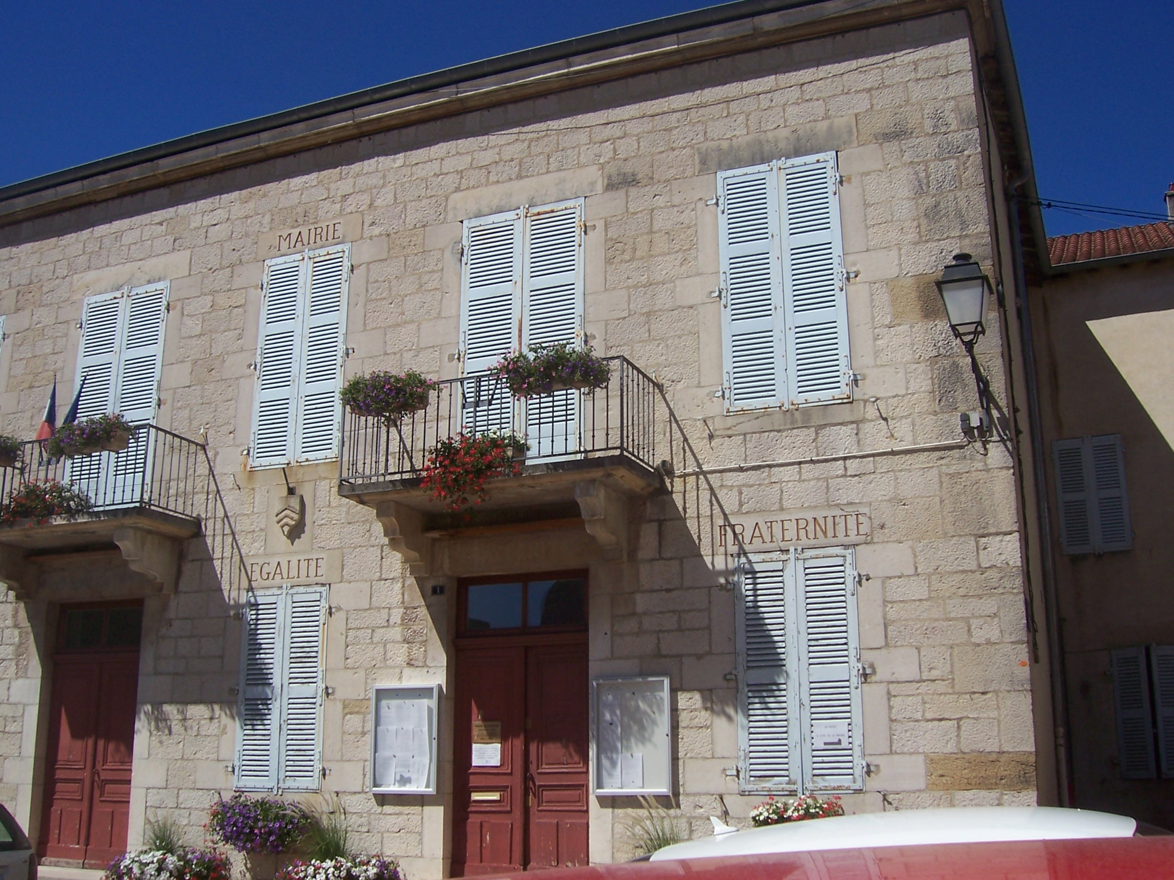 Mairie de Cuiseaux